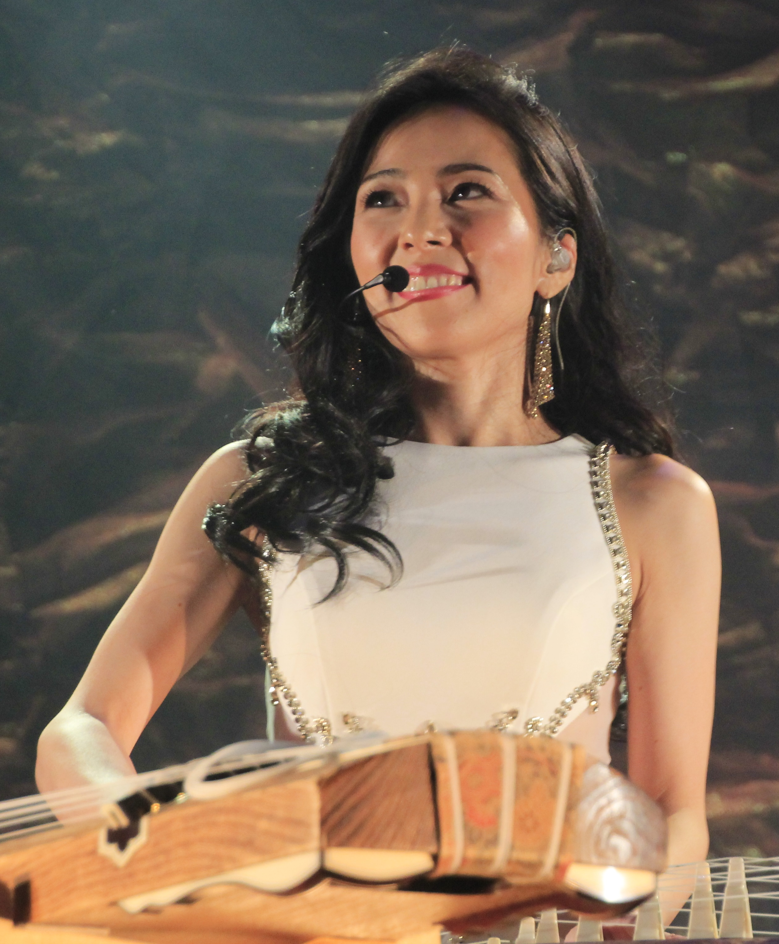 吉永真奈